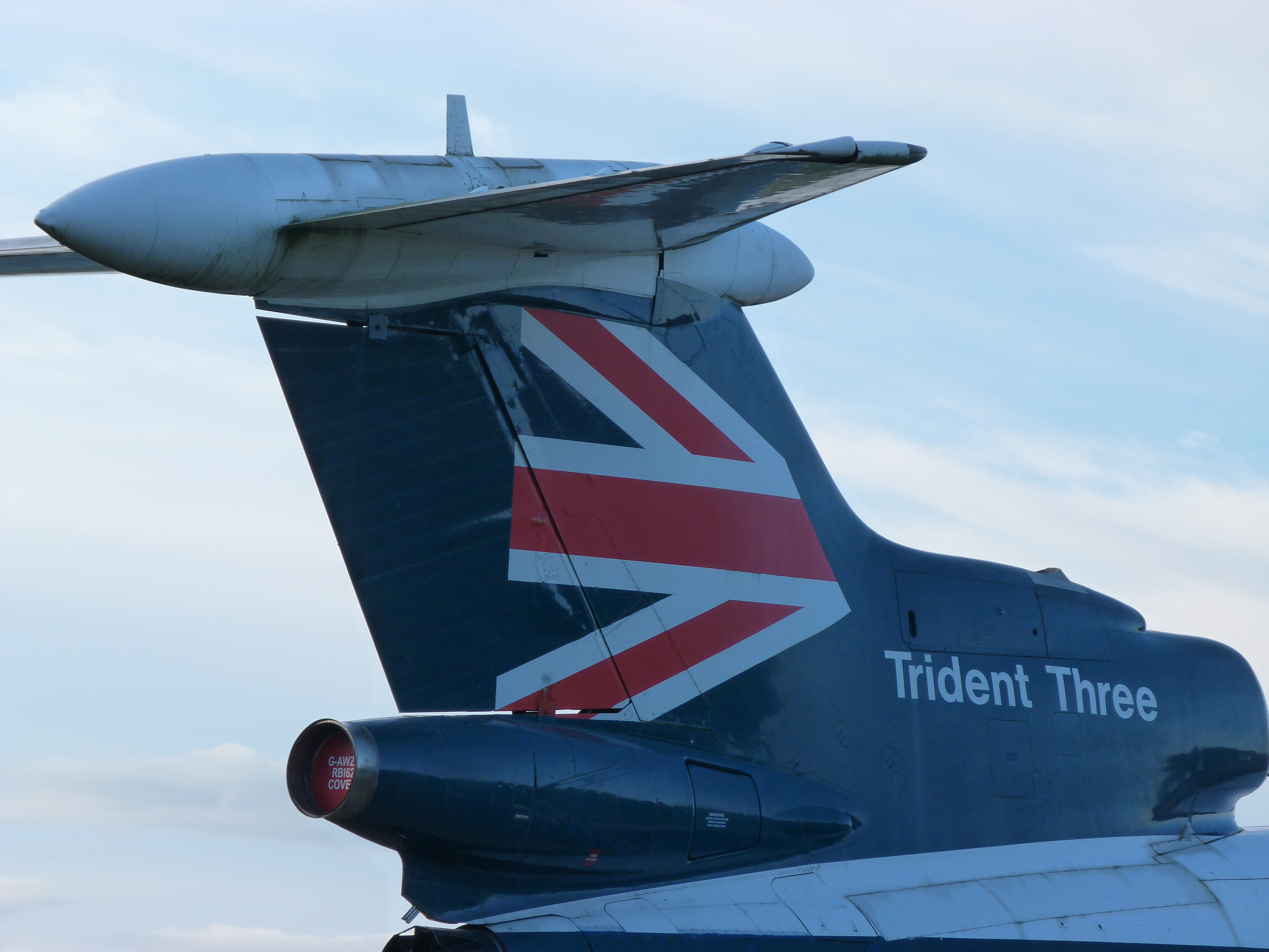 G-AWZK Trident 3